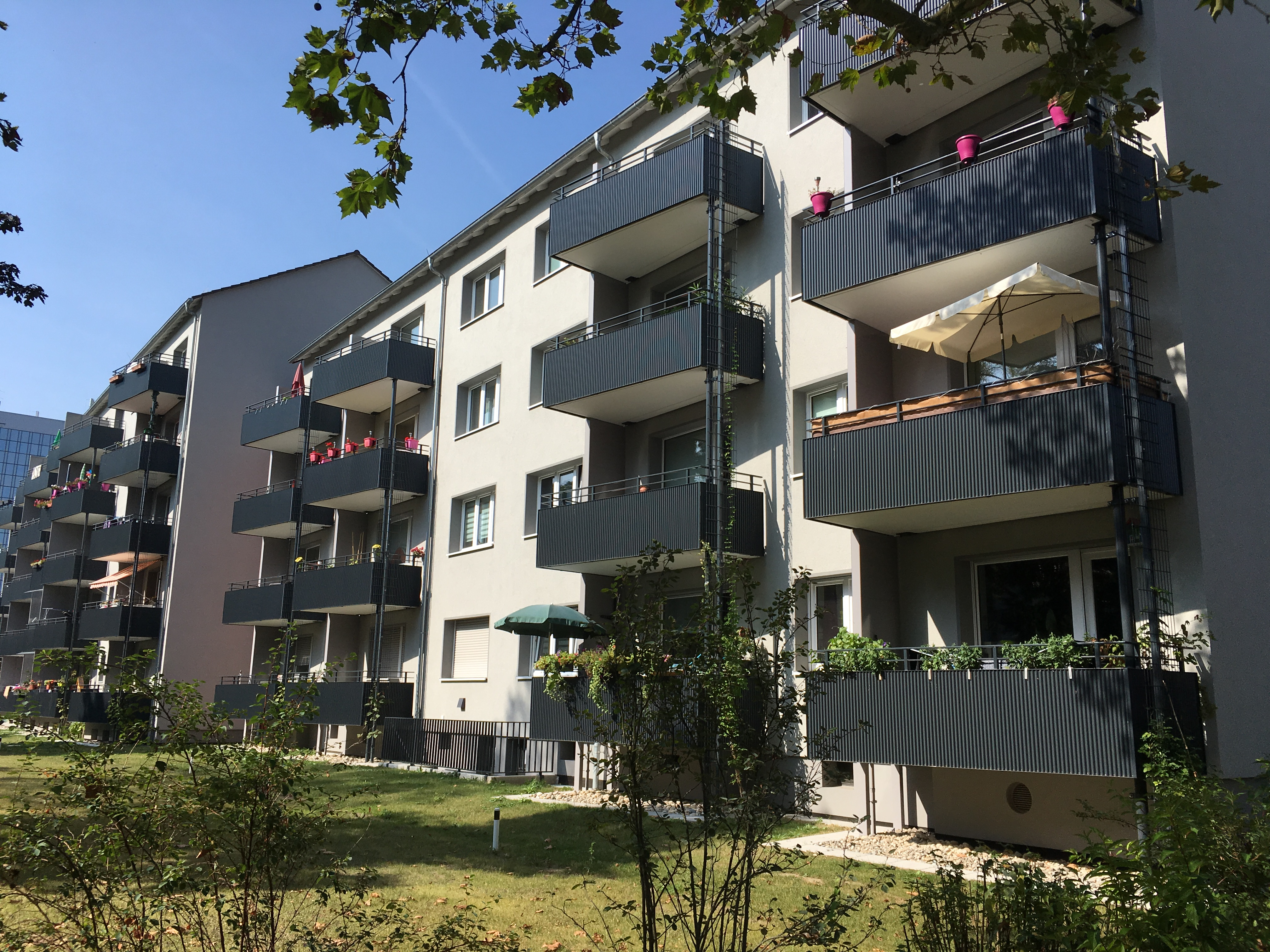 Adolf-Miersch-Siedlung in Frankfurt-Niederrad; erbaut überwiegend in den 1950er Jahren; nach dem Baustadtrat Adolf Miersch benannt; Wohngebäude Melibocusstraße